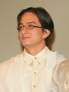 Filipino actor Ryan Agoncillo